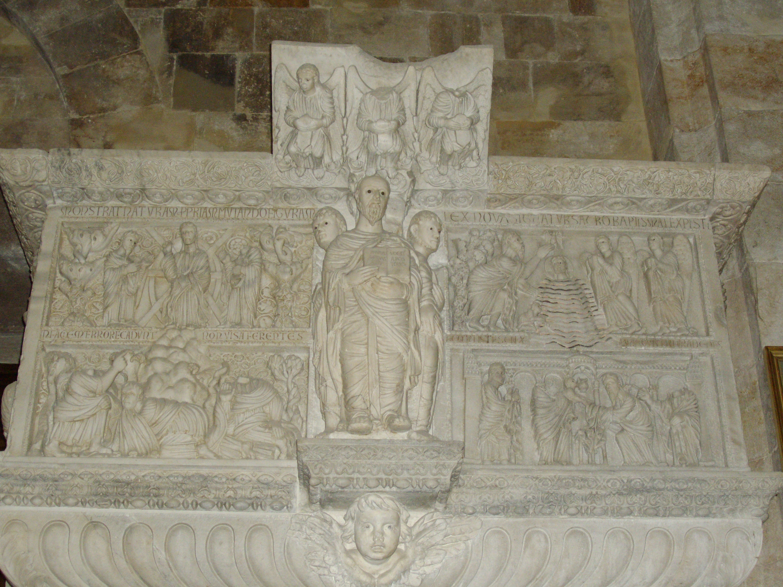 pulpito di maestro Guglielmo (XII secolo), Duomo di Cagliari